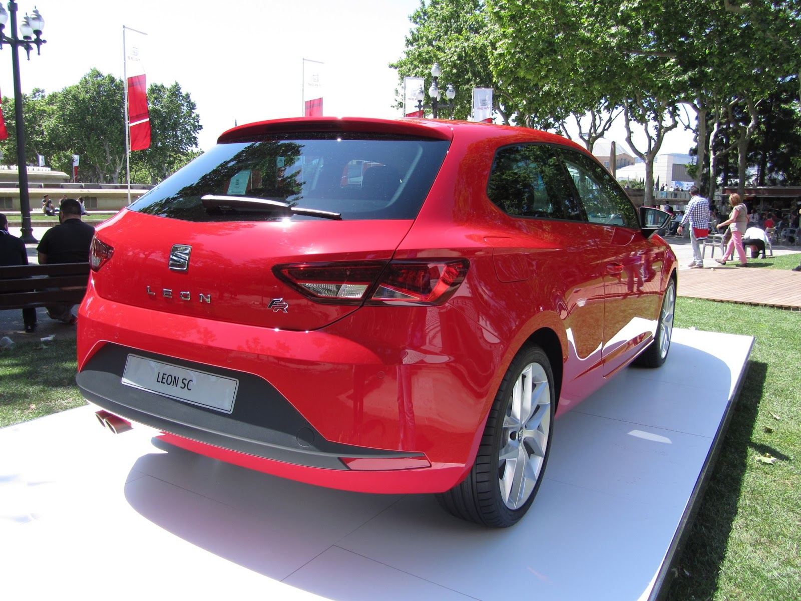 Trasera del León SC